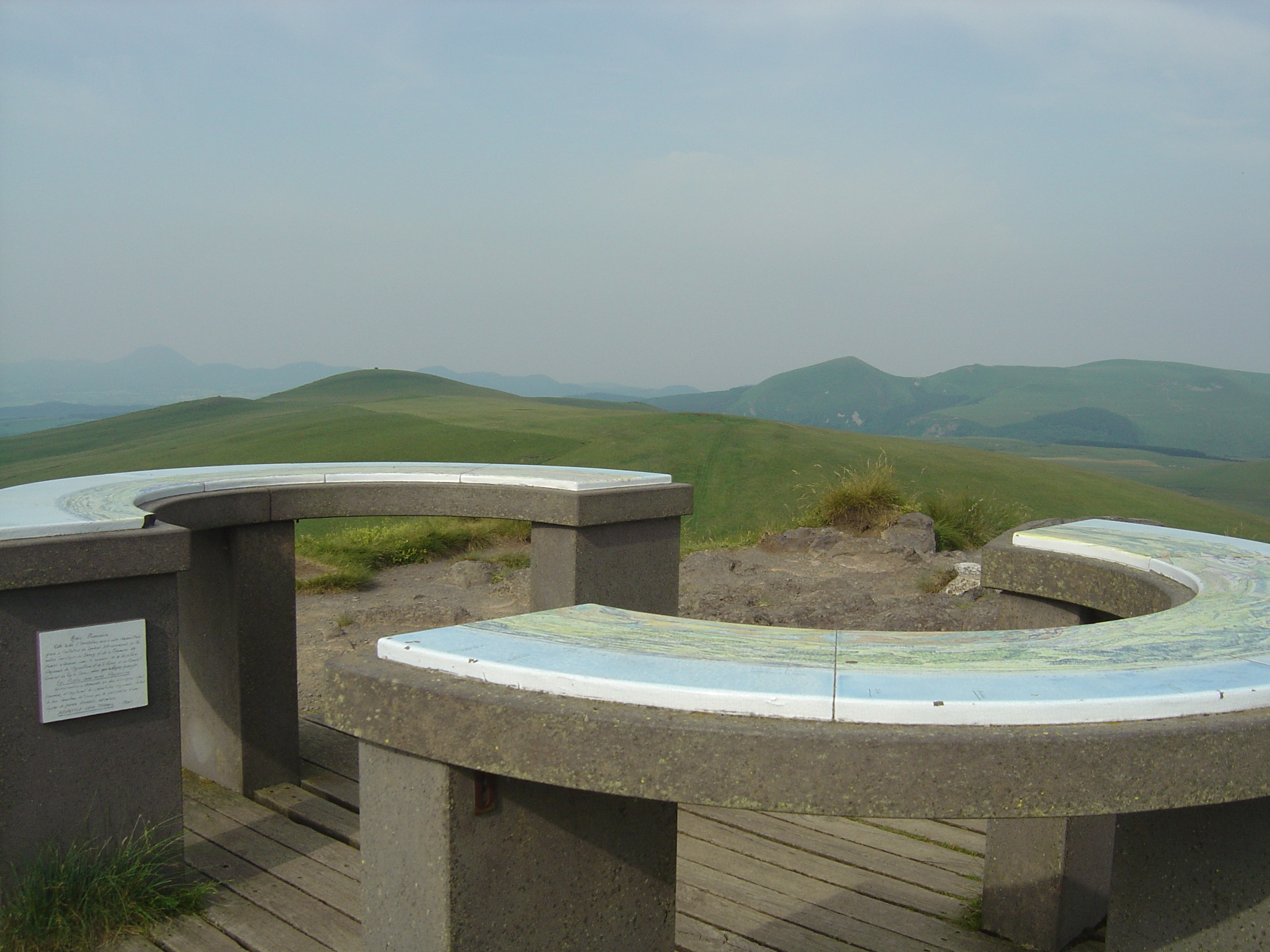 Table d'orientation de la Banne d'Ordanche. Vue au loin sur le sommet au-dessus du col de Guéry